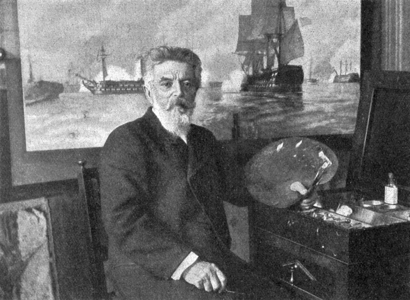 Александр Карлович Беггров за работой в своей мастерской, в Гатчине